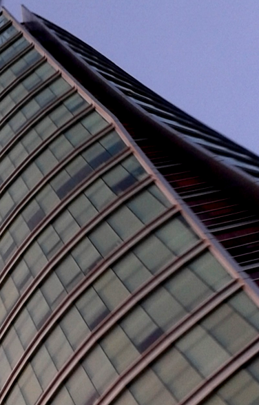 Tuxtla Gutiérrez - Torre Chiapas Perspectiva